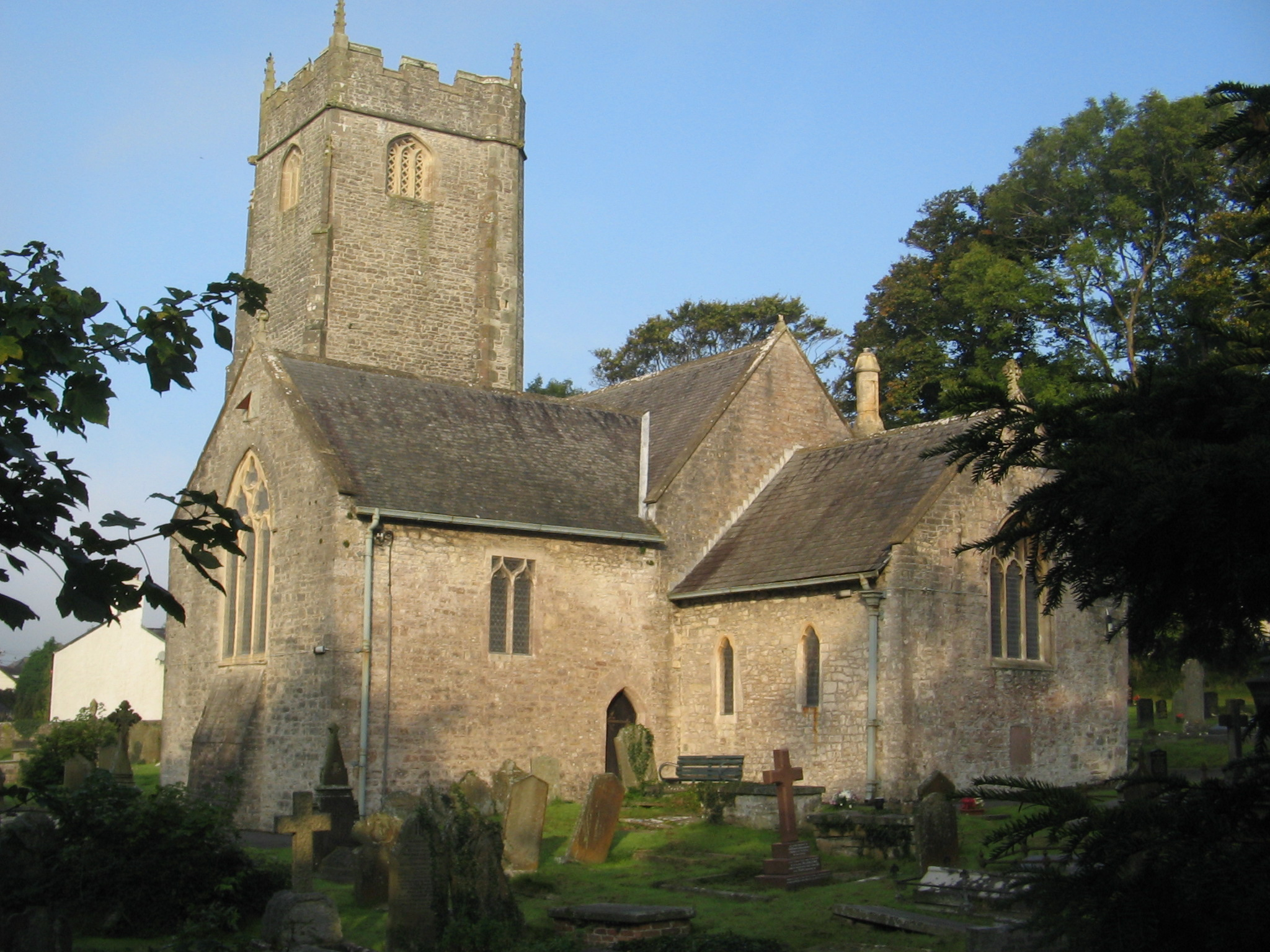 Llanblethian church